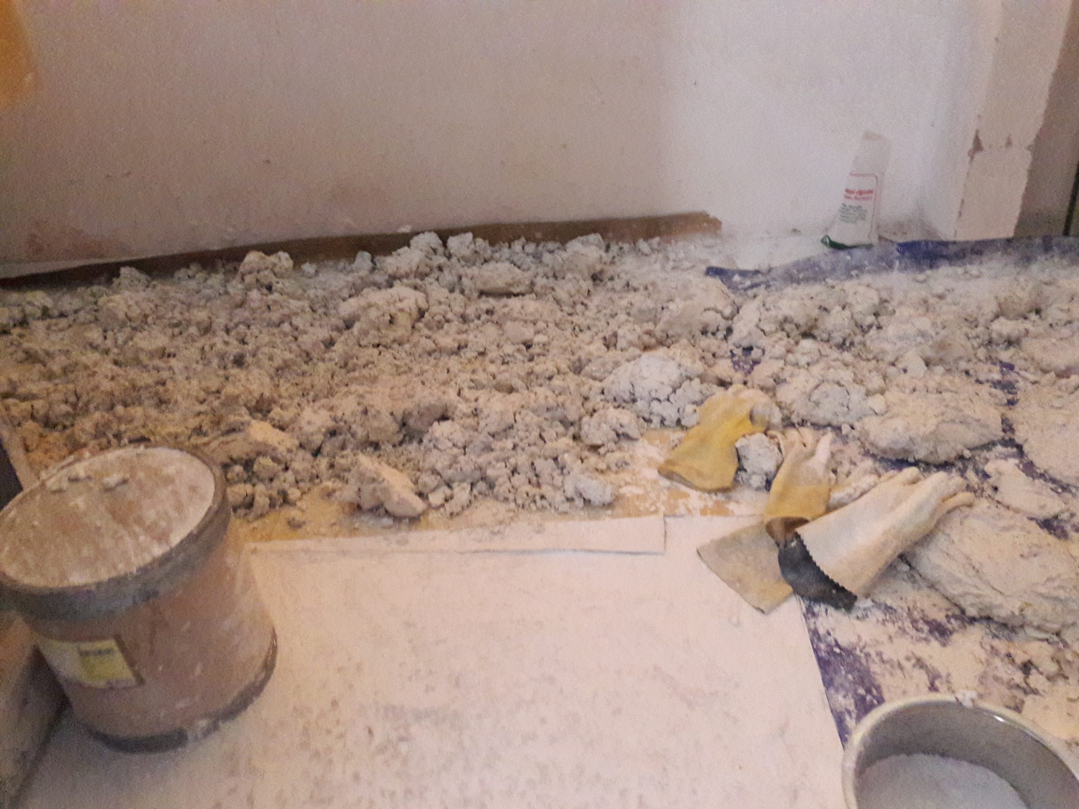 മലപ്പുറം ജില്ലയിലെ തവനൂര്‍ കേളപ്പജി കാര്‍ഷിക കോളേജില്‍ വിപണനത്തിനായ് സ്യൂഡോമോണസ്_ഫ്ലൂറസൻസ് തയ്യാറാക്കുന്നു.